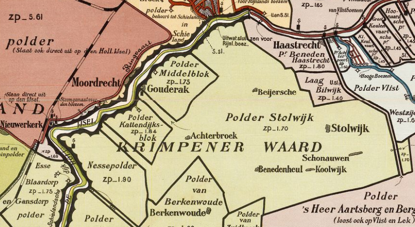 Polder Stolwijk e.o